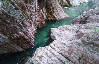 Descrizione: La Breggia scorre sull'Ammonitico Rosso Fonte: Foto personale Data: aprile 2006 Luogo: Parco delle Gole della Breggia, Ticino (Svizzera) Autore: Giono